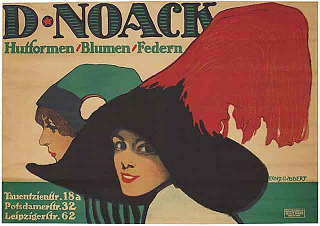 Plakat D. Noack. Hutformen - Blumen - Federn. Berlin